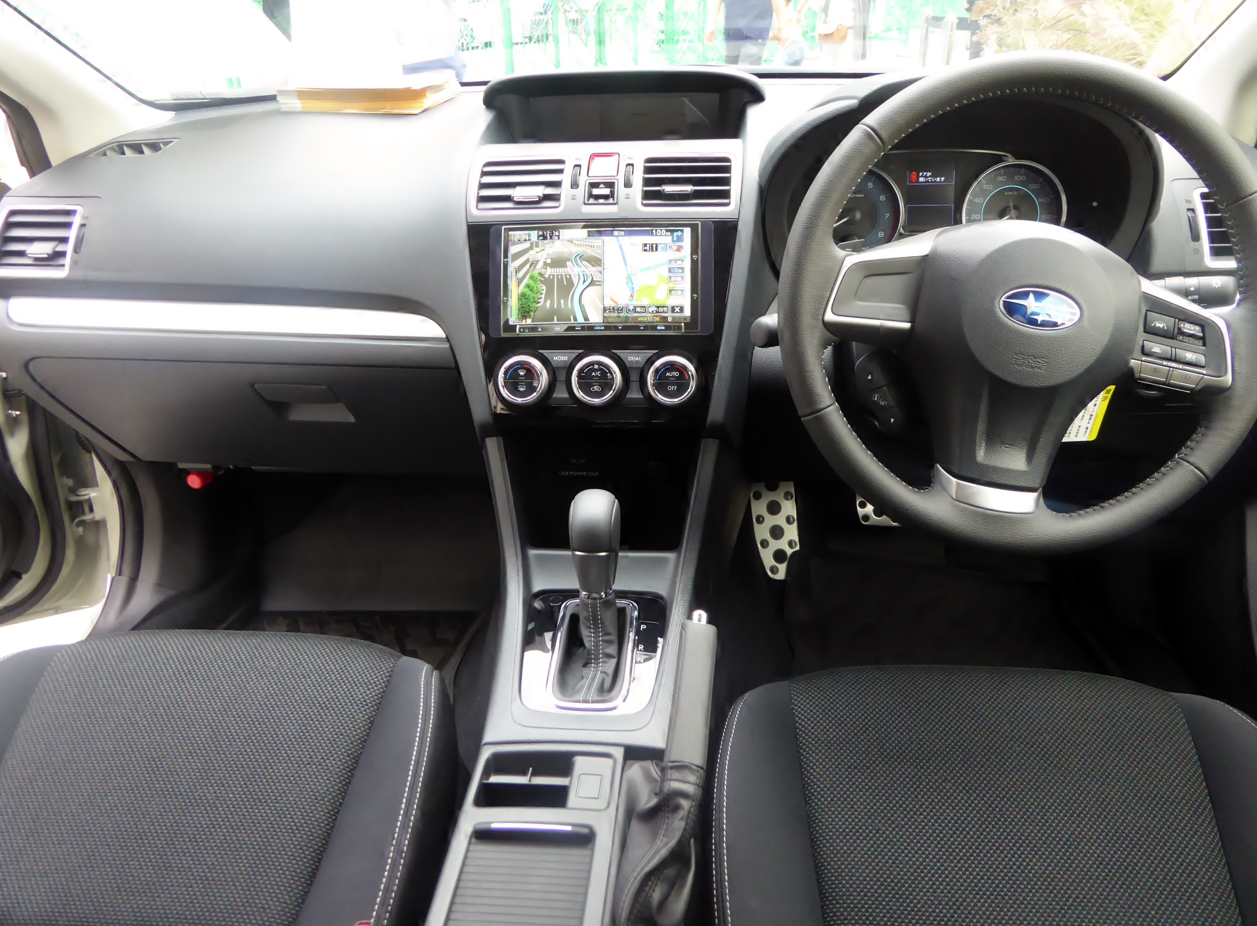 GP7型スバル・XV 2.0i-L EyeSightのインテリアを撮影。